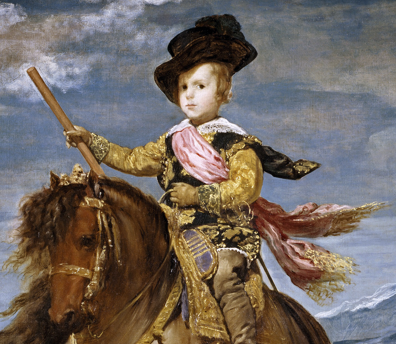 Retrato ecuestre del príncipe Baltasar Carlos de Austria (1629-1646), que fue hijo del rey Felipe IV de España y de la reina Isabel de Borbón.